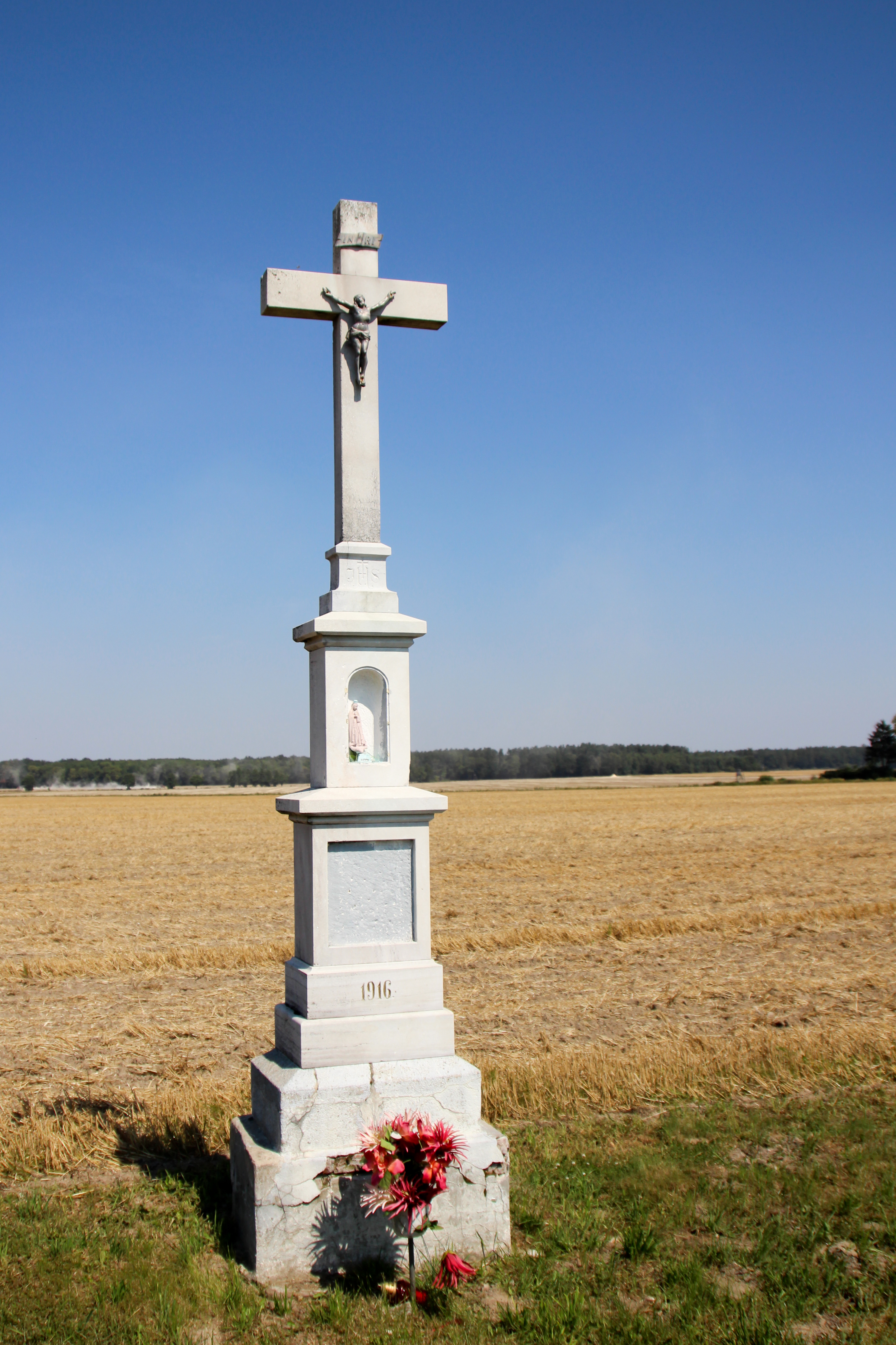 Krzyż przydrożny w gminie Korfantów w Polsce położona w województwie opolskim, w powiecie nyskim.